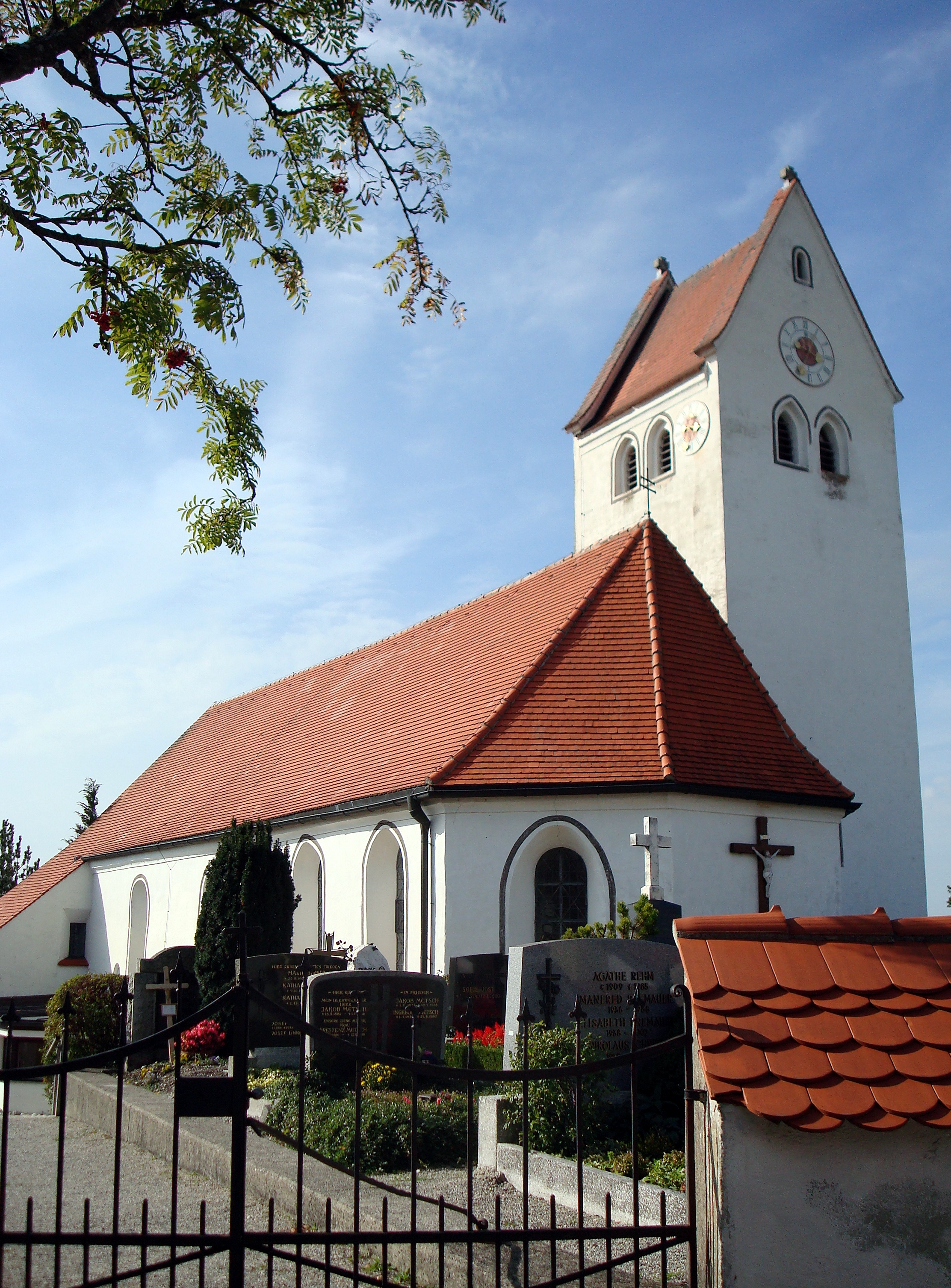 Andechs, OT Frieding, Pankrazweg 20, Kirche St. Pankratius. Die Ersterwähnung einer Kirche in Frieding stammt aus dem Jahre 1258. Ihr heutiges Aussehen erhielt sie 1792 durch eine umfassende Renovierung. This is a photograph of an architectural monument.